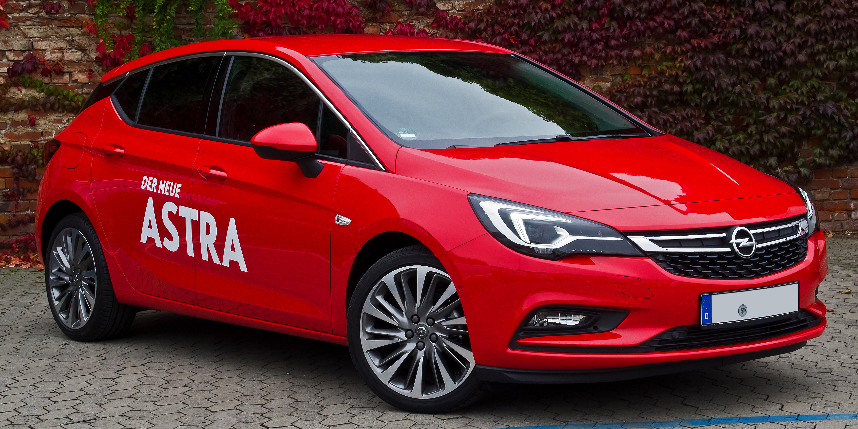 Opel Astra 1.4 EDIT ecoFLEX Innovation (K)